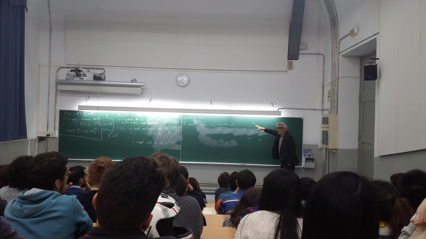 El Dr. Eduardo Casas-Alvero, la tarda del 16 de març de 2016, fent una conferència sobre la conjectura que porta el seu nom a l'aula B3 de la Facultat de Matemàtiques de la Universitat de Barcelona.